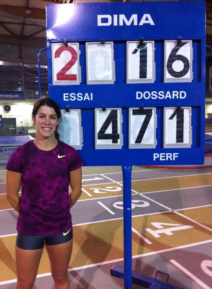 Marion Fiack posant fièrement devant son record de France